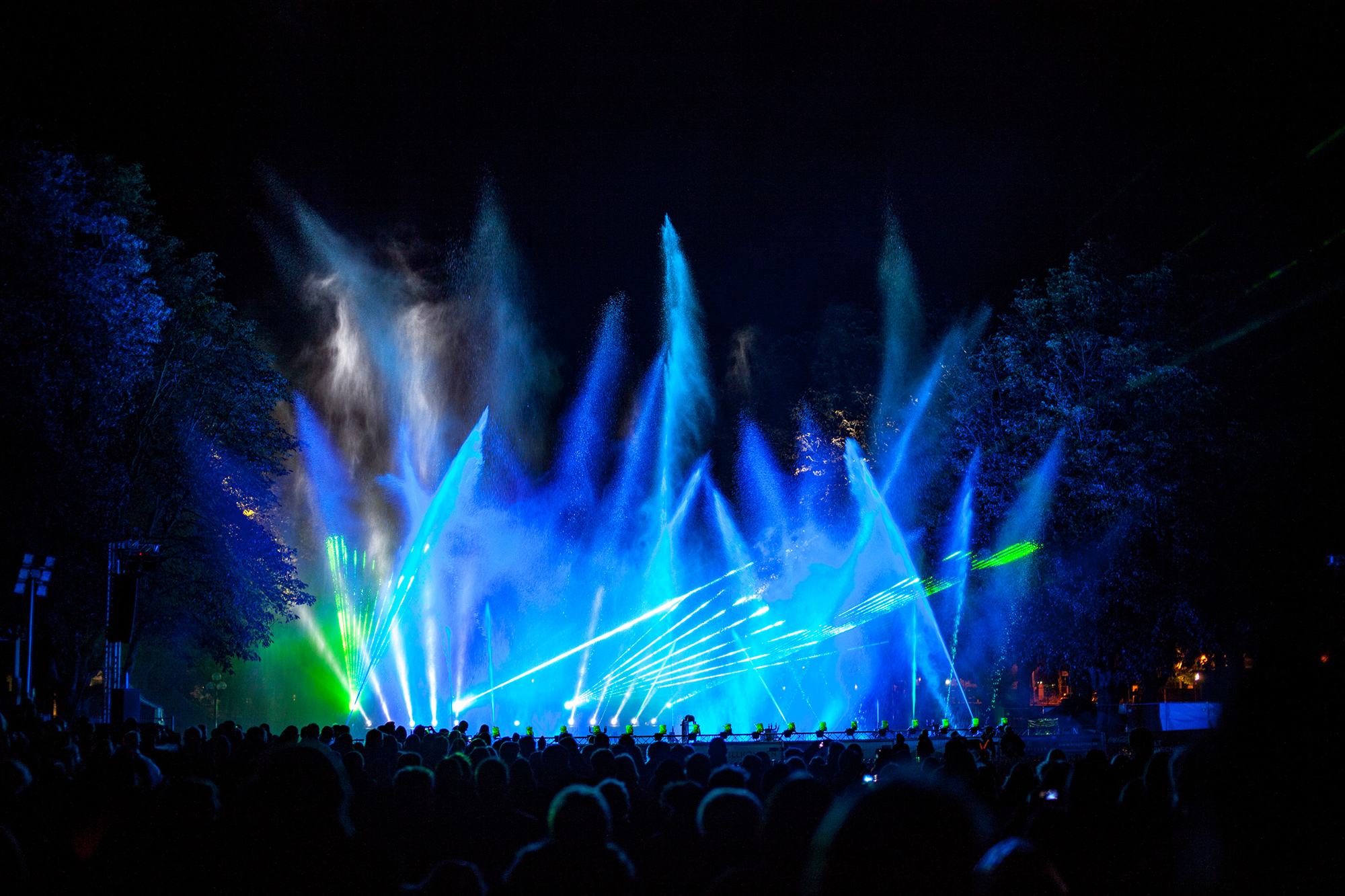 Das Bild zeigt die Klangwelle 2017 im Kurpark Bad Neuenahr. Es sind die Wasser-, Licht- und Lasereffekte sichtbar.